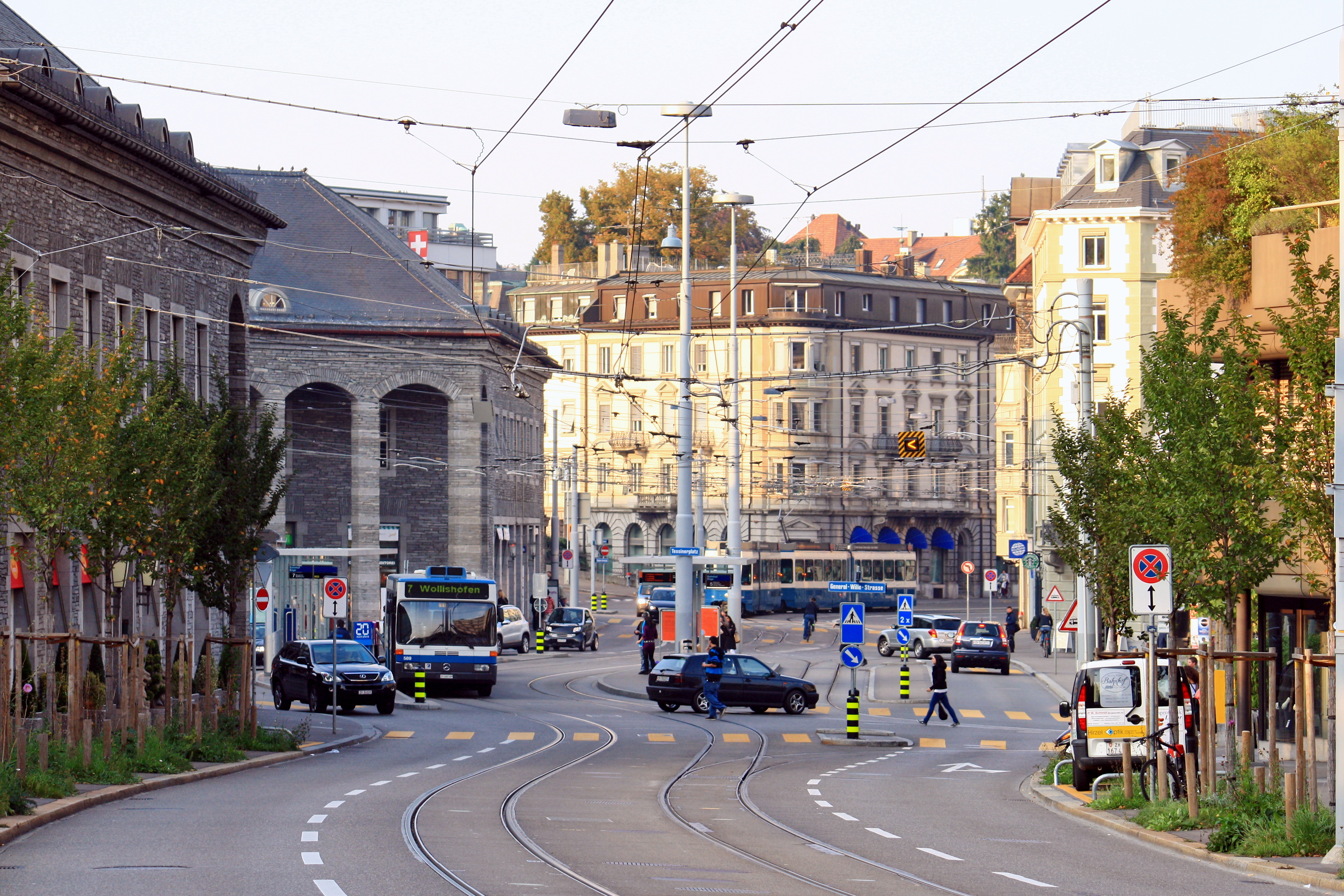 Tessinerplatz in Zürich-Enge (Switzerland)